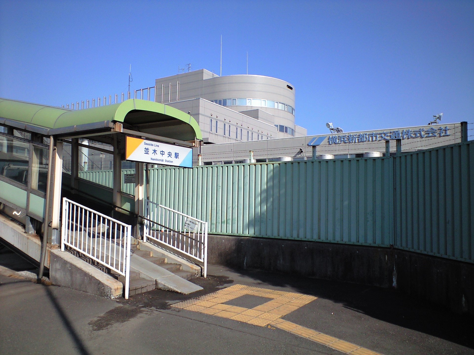 横浜新都市交通本社・並木中央駅東口